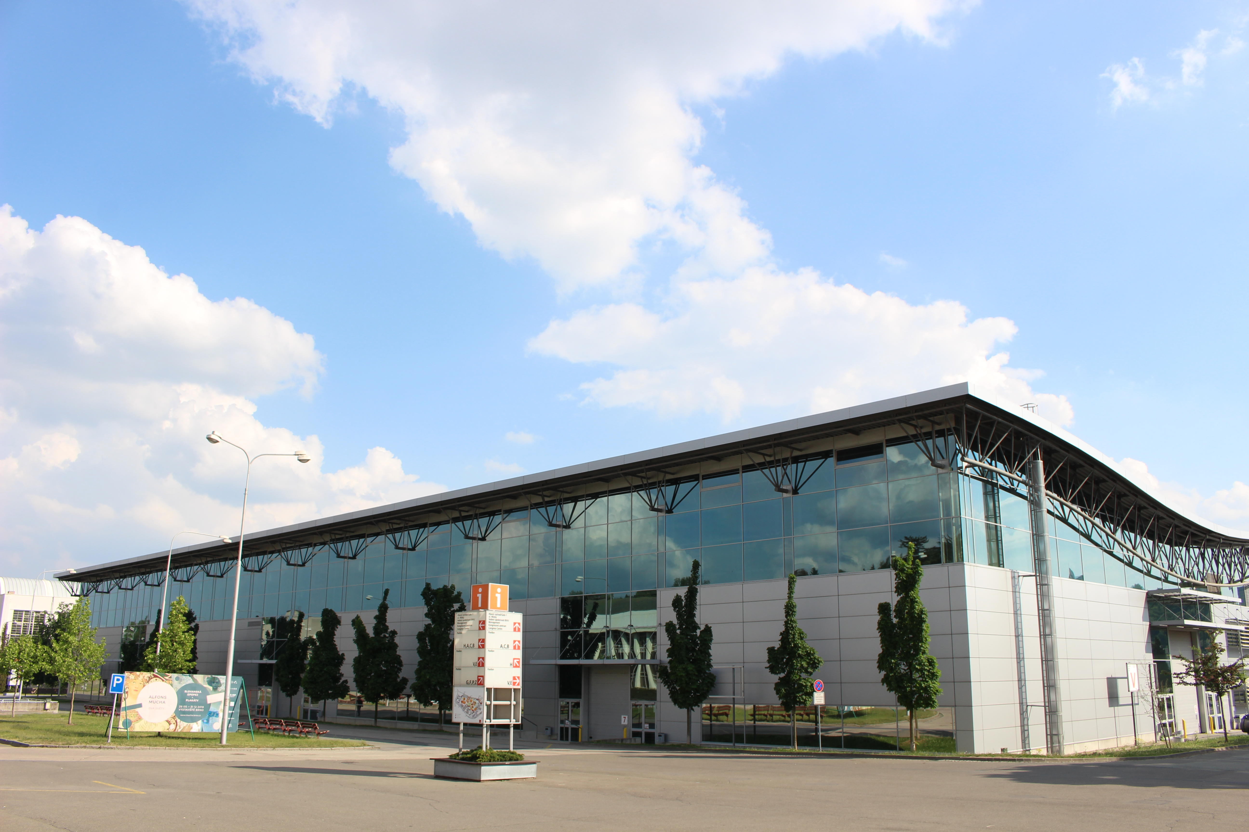 Pavilon V, Brněnské výstaviště